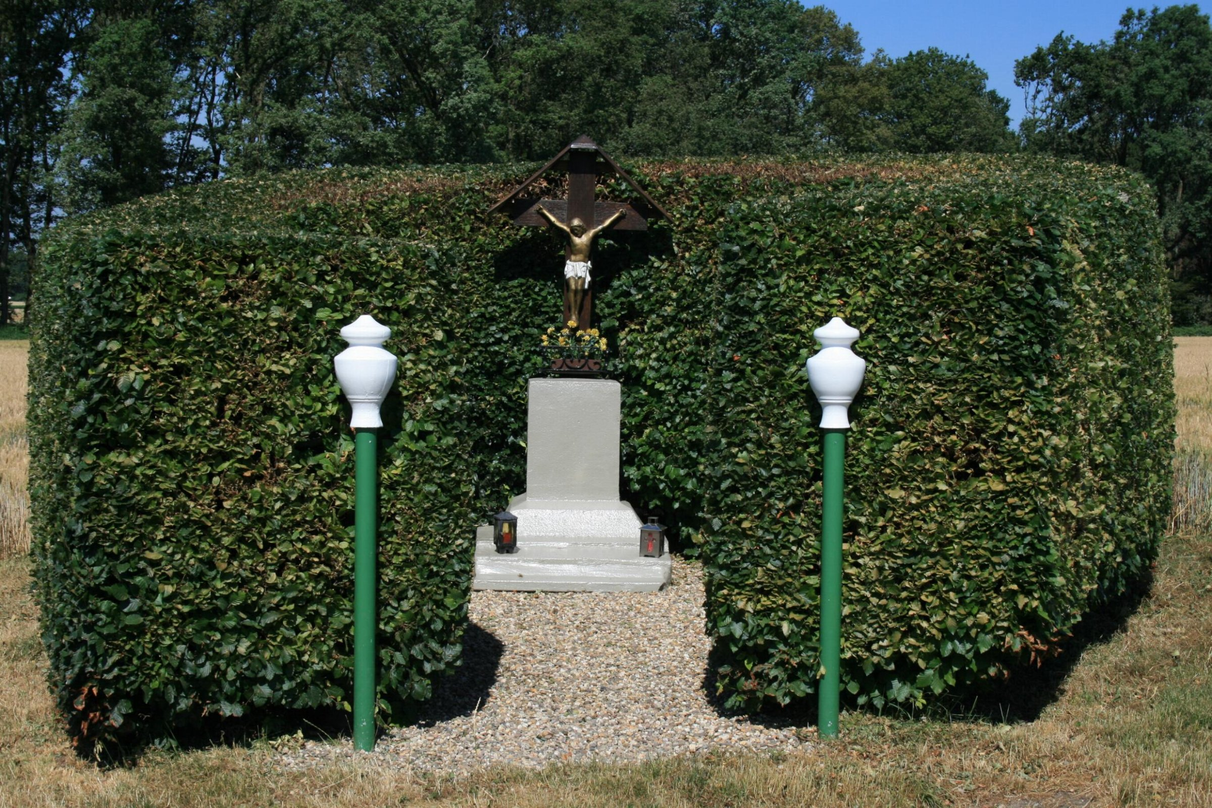 Wegekreuz Am Lehloher Pfad Mönchengladbach in Genhodder